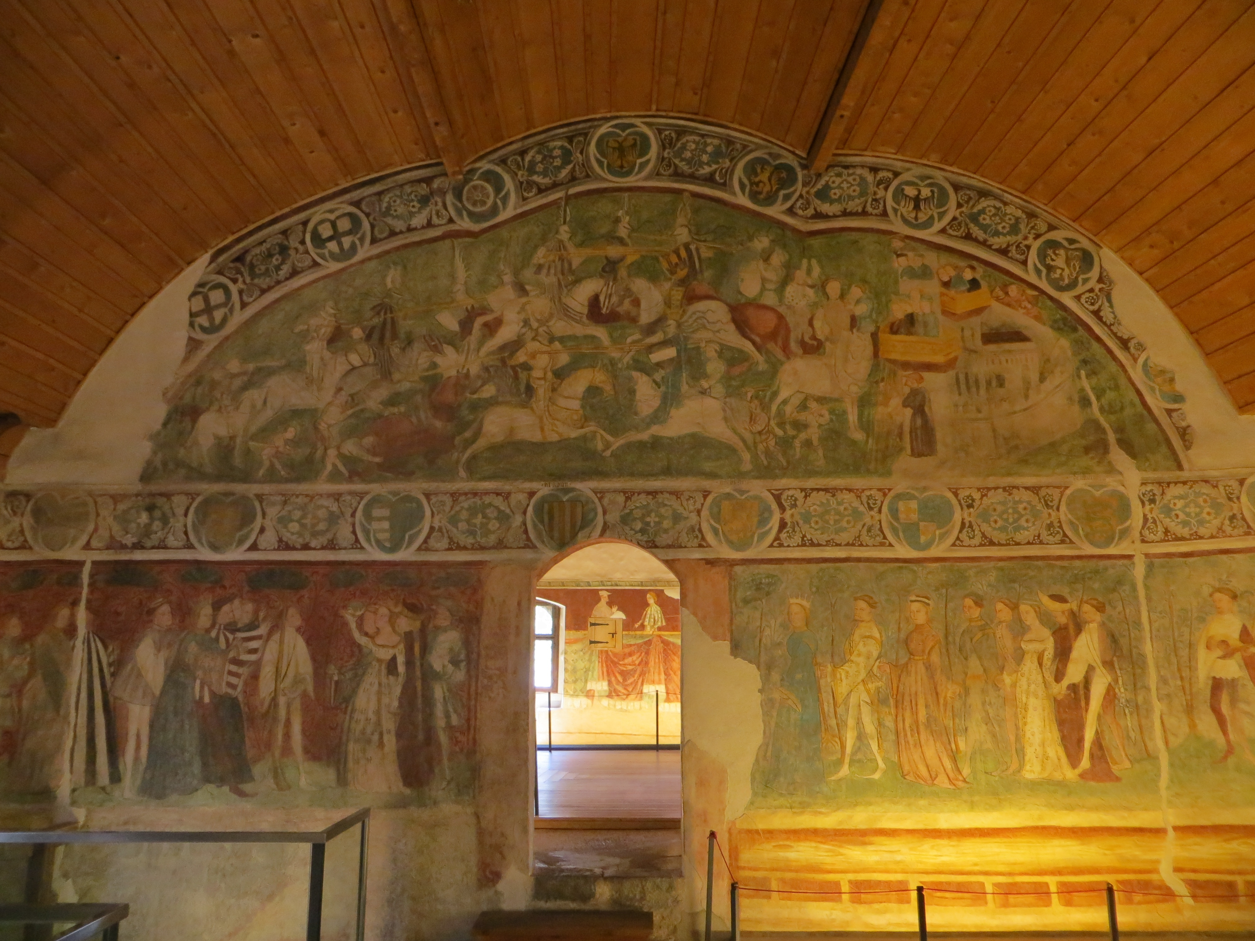 Runkelstein Castle